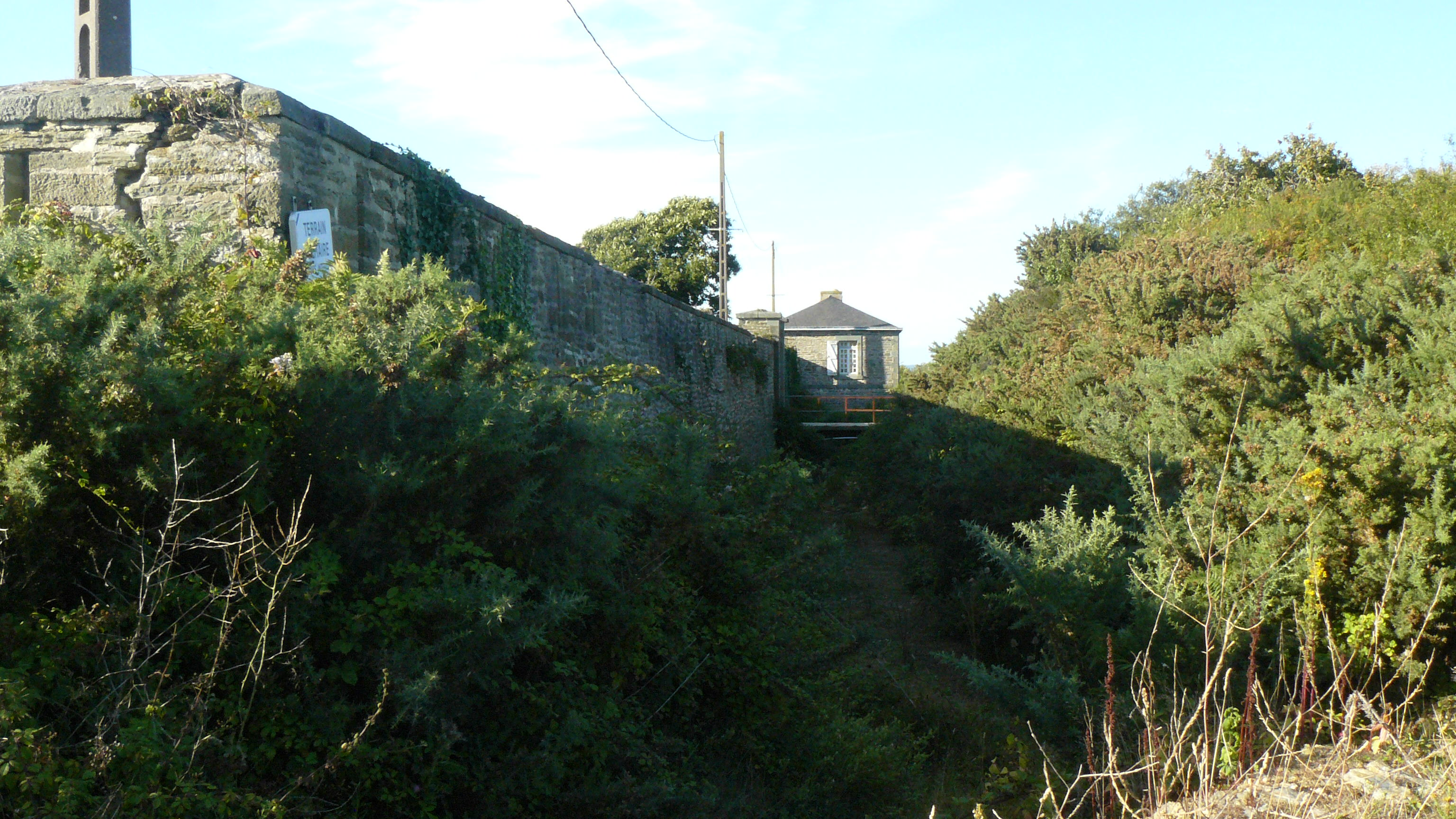 Le fort du Haut-Grognon est construit à la fin du XIXe siècle et est occupé militairement jusqu'à la fin de la seconde guerre mondiale.